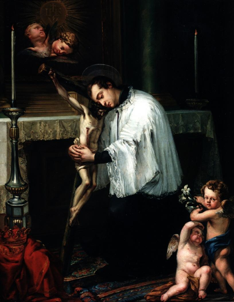 La obra representa al religioso jesuita italiano San Luis Gonzaga abrazando una imagen de Cristo crucificado.